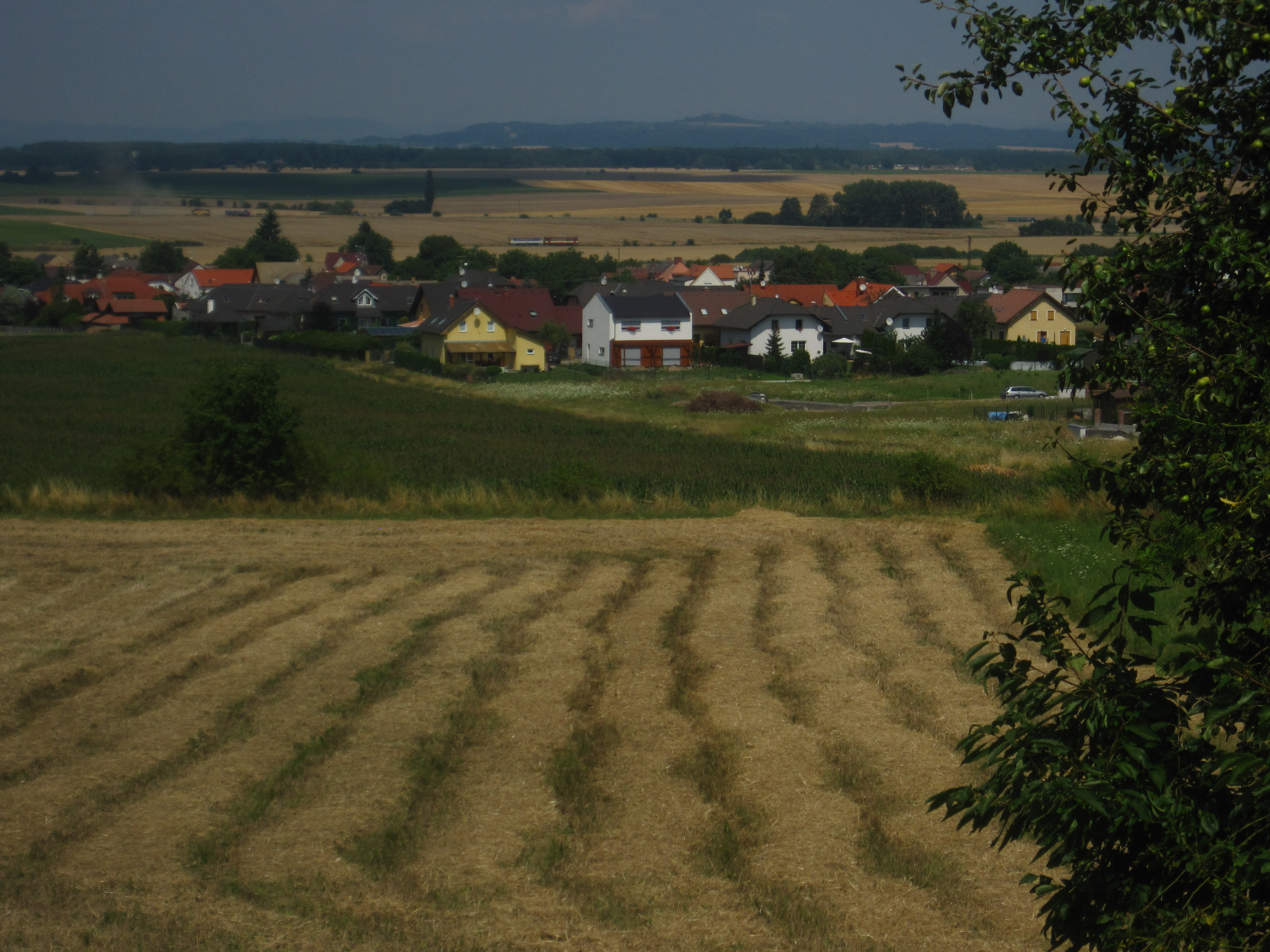 Kolomuty od jihu (od silnice na Holé Vrchy)